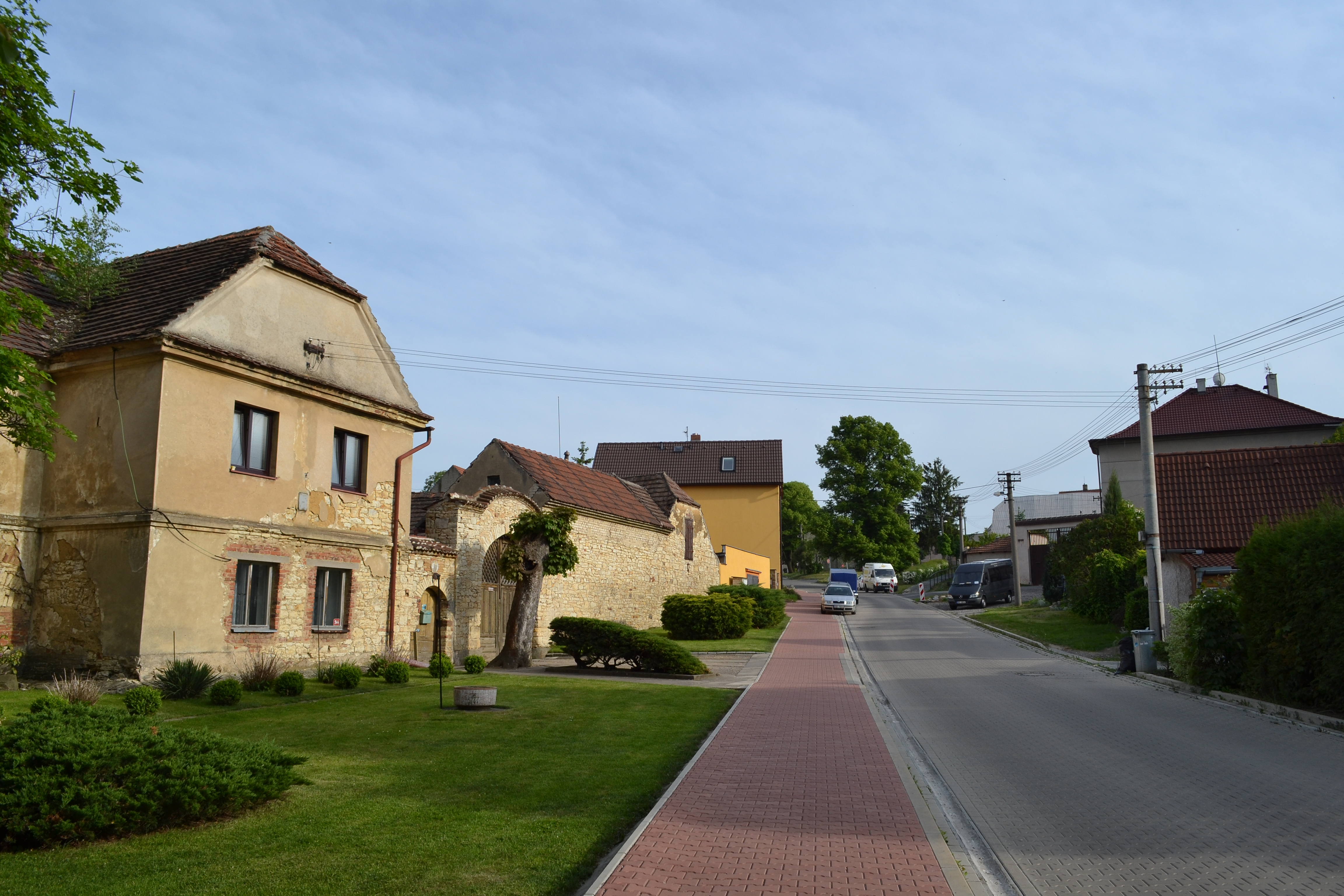 Družstevní ulice v Jenečku v Hostivici Unknown